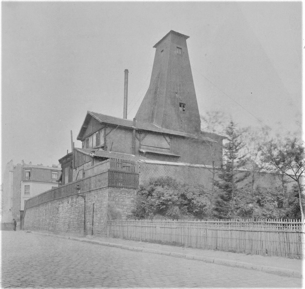 Puit artésien